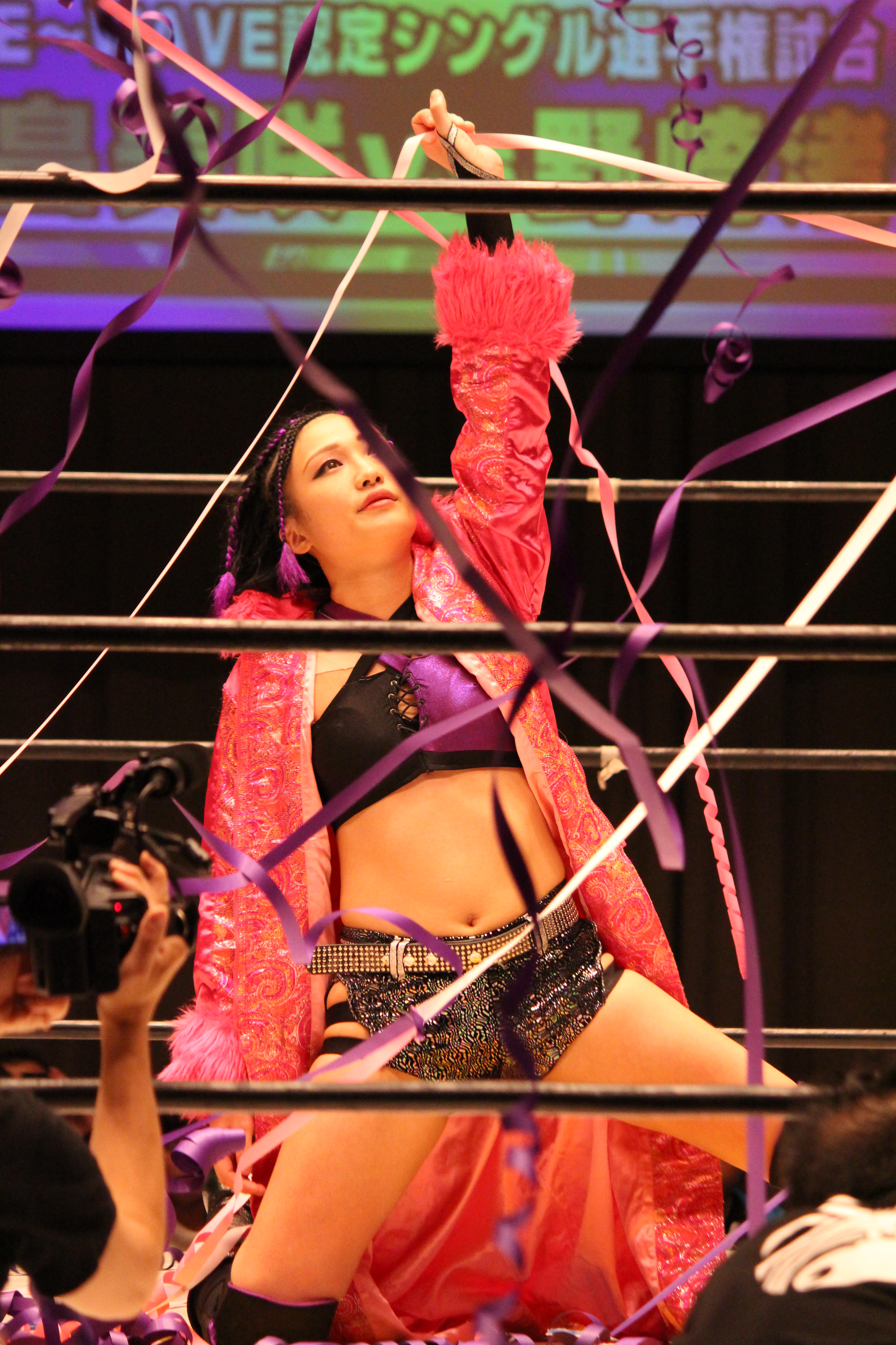 2017.11.26WAVE後楽園大会 Rgina di WAVE戦での野崎渚